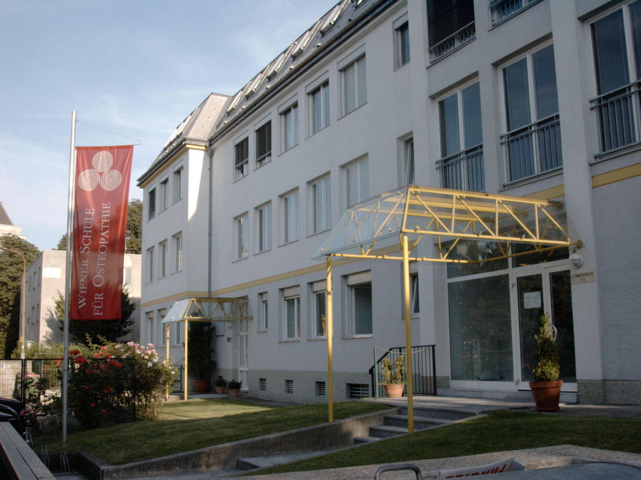 Gebäude der Wiener Schule für Osteopathie Frimbergergasse Wien XIII.